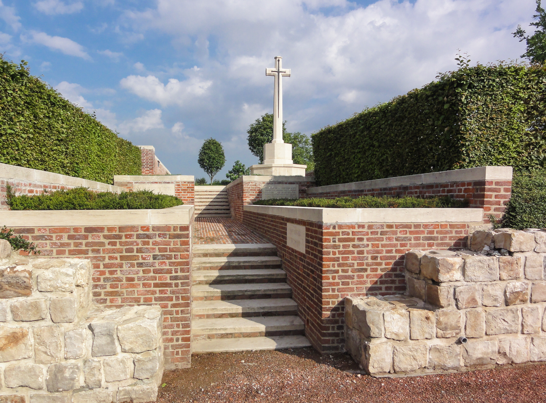 Ghissignies British Cemetery